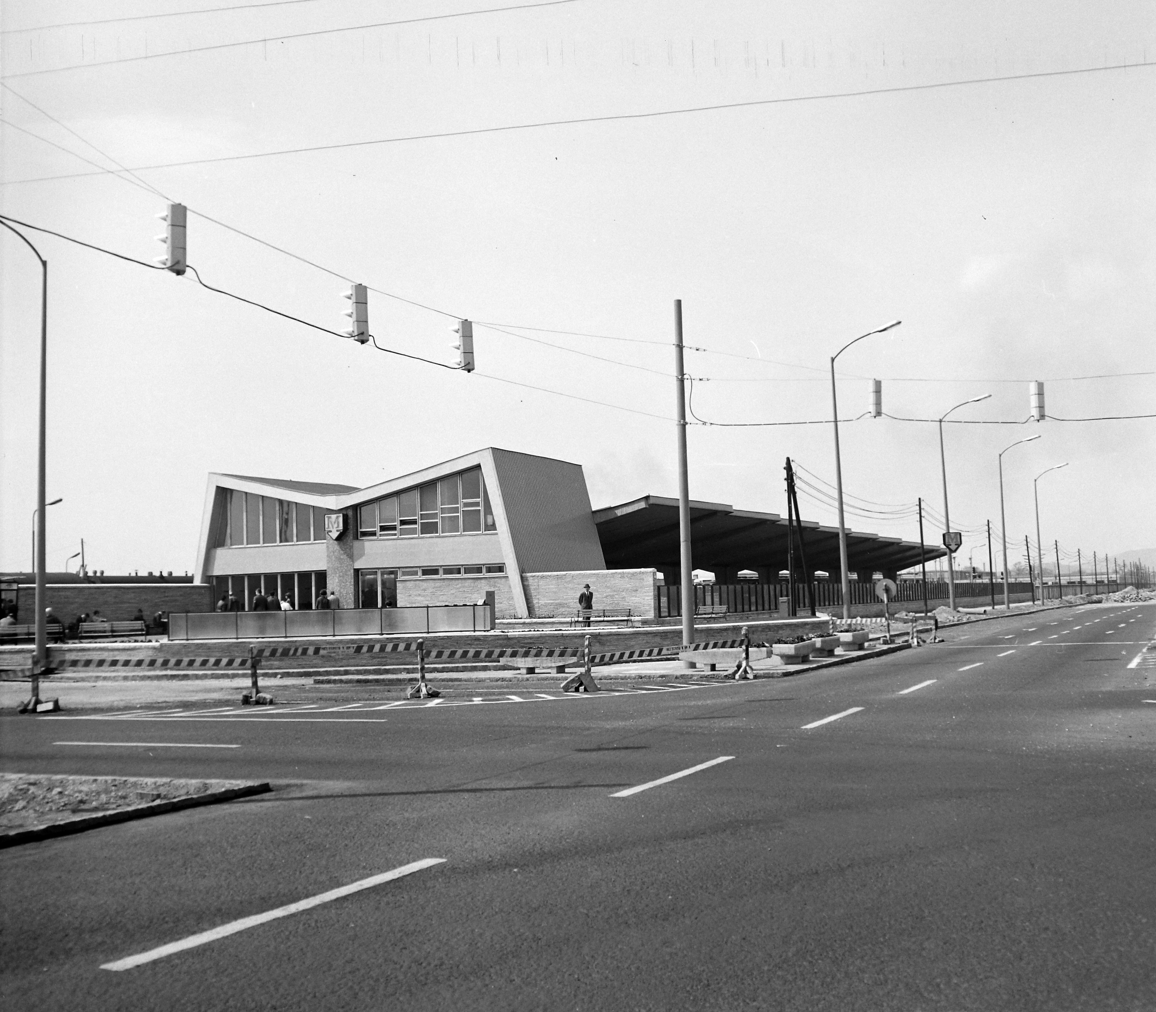 Örs vezér tere (Fehér út) metróvégállomás. Location: Hungary, Budapest XIV. Tags: subway station, subway, Budapest Title: Örs vezér tere (Fehér út) metróvégállomás.